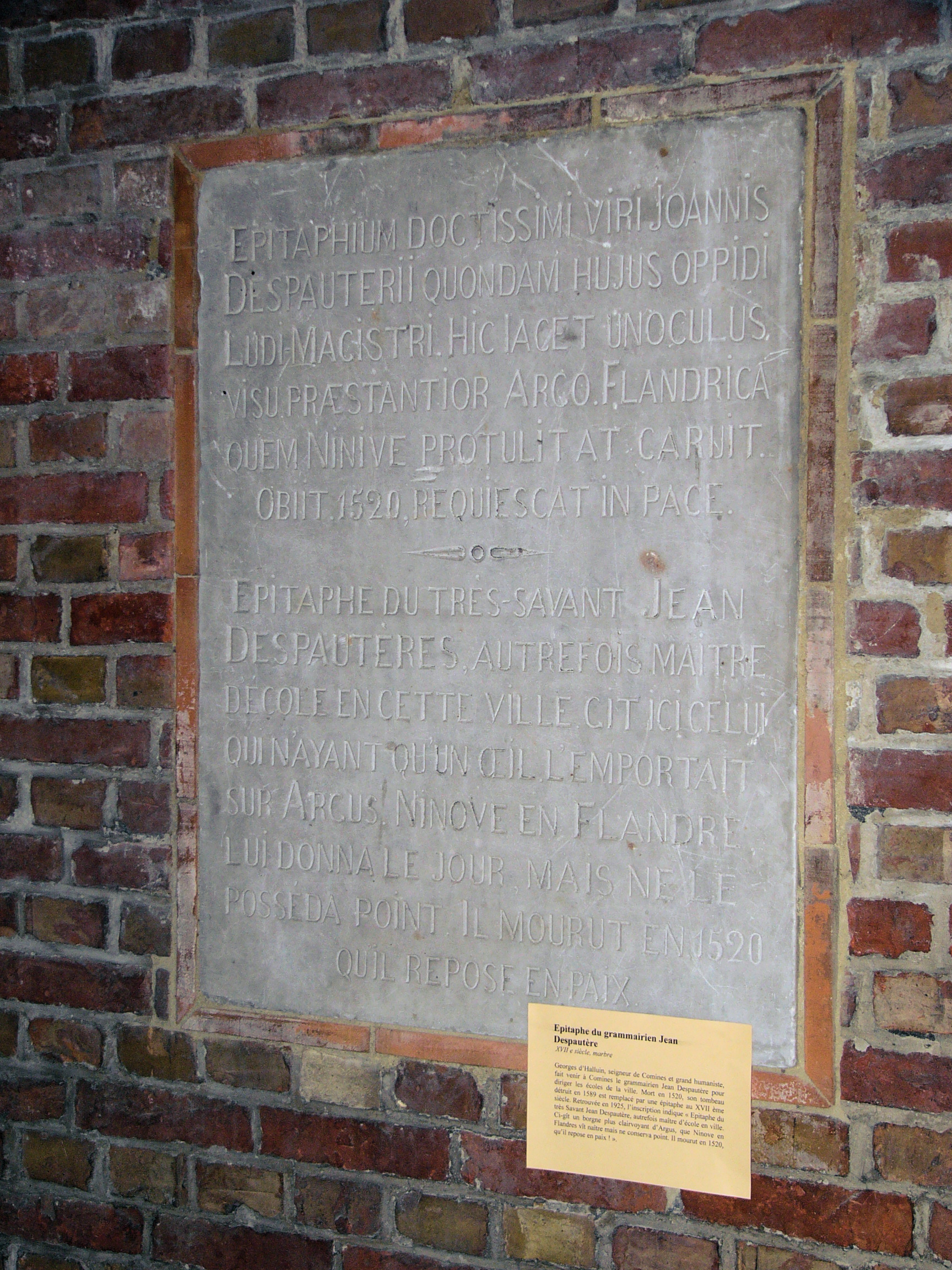 DESPAUTERE EPITHAPHE DU GRAMMAIRIEN JEAN DESPAUTERE DANS L'EGLISE ST CHRYSOLE DE COMINES FRANCE